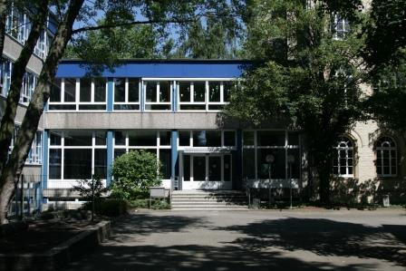 Eingangsbereich der Möser-Realschule am Westerberg - Schulgebäude ab 2004